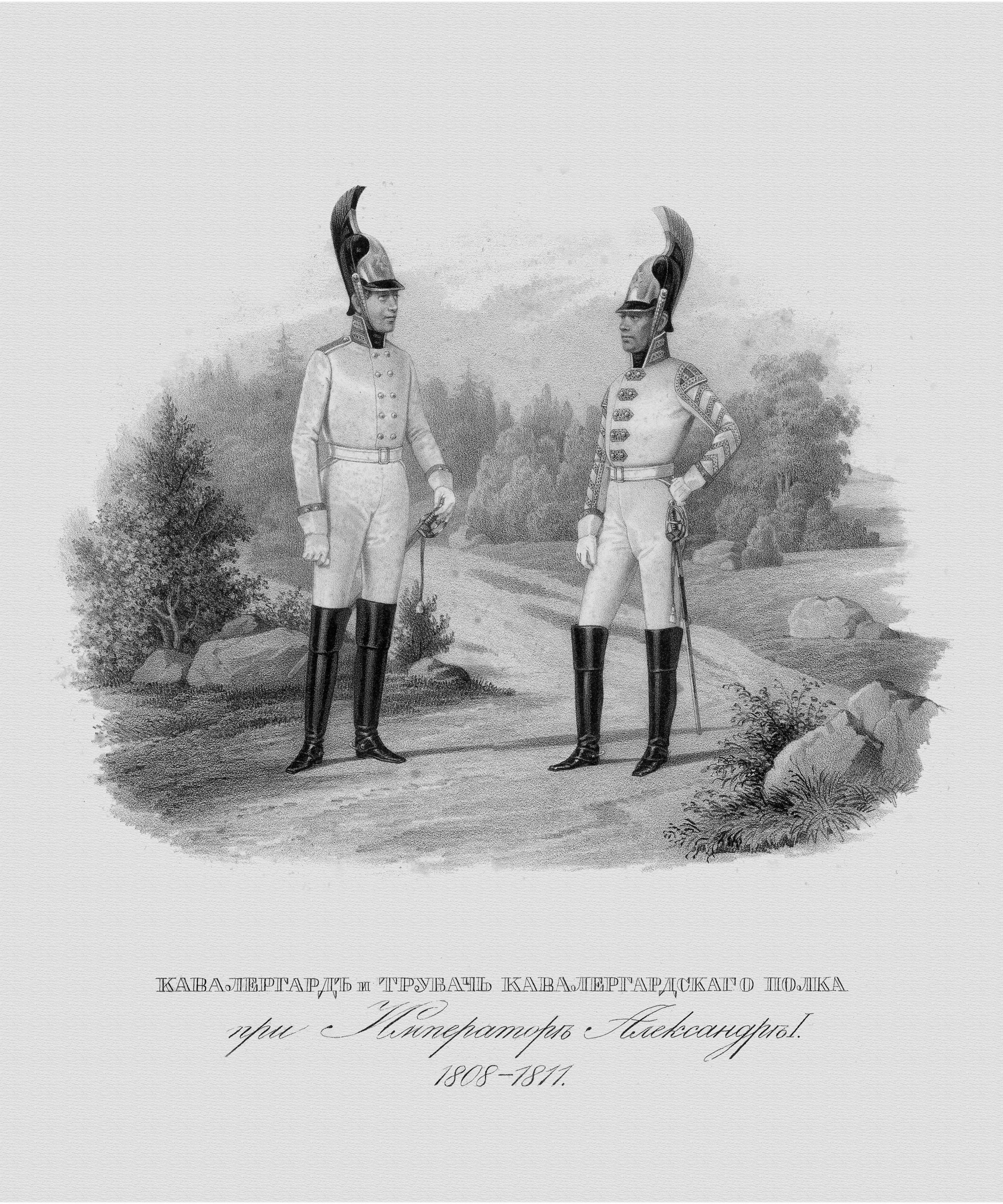 lithographie représentant les uniformes du régiment impérial russe des Chevaliers Gardes